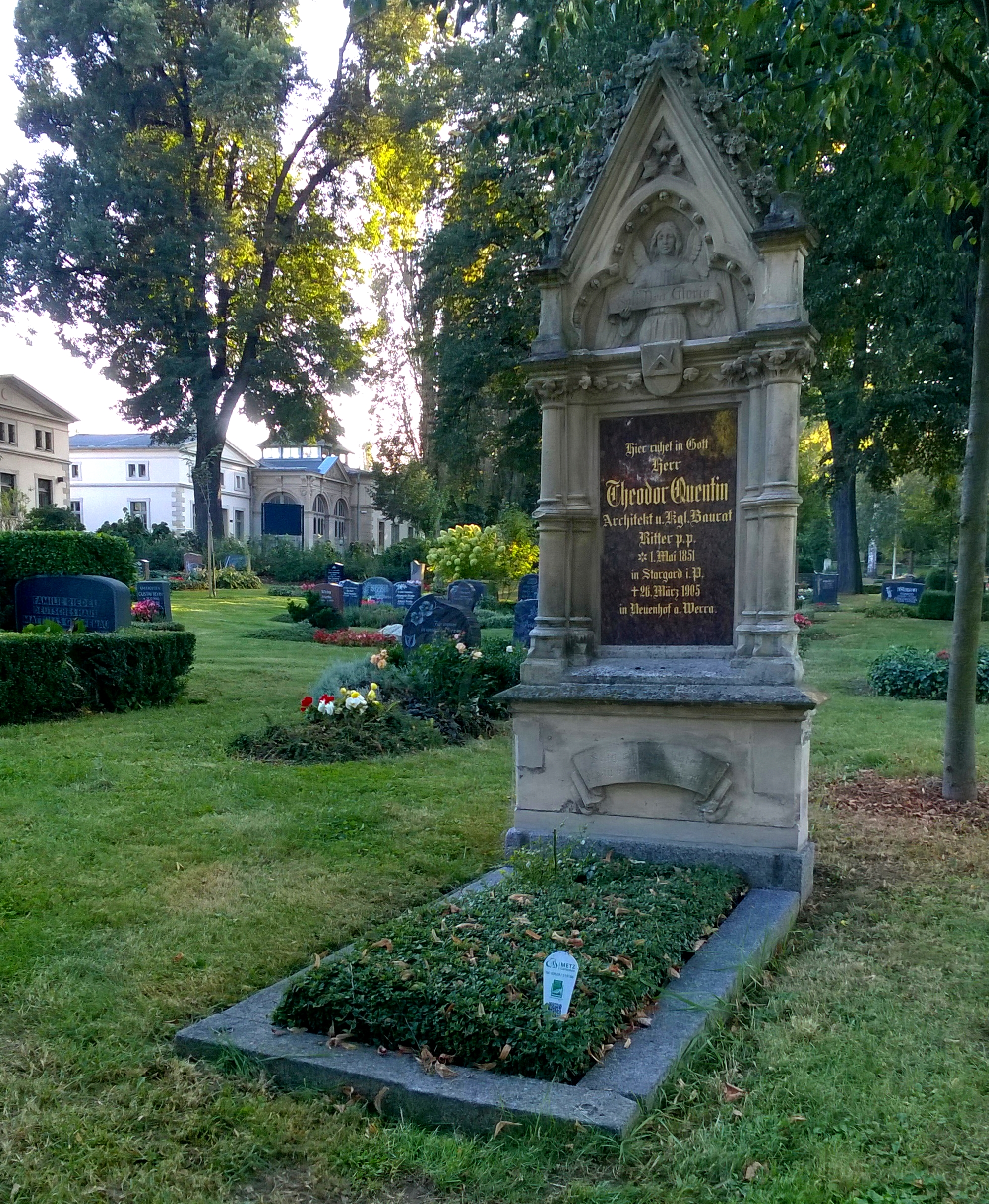 Grabstelle des Architekten Theodor Quentin (1851-1905) auf dem Friedhof in Pirna.